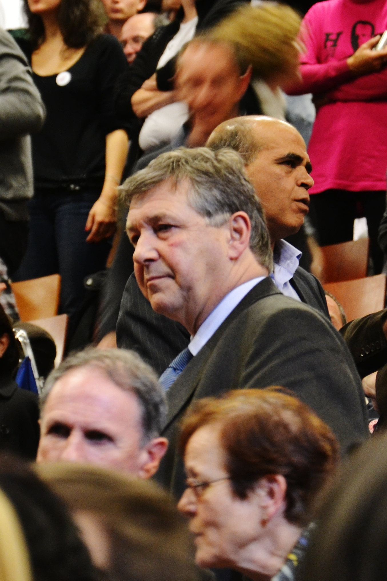 Philippe Nauche, député-maire PS de Brive (Corrèze, France), au meeting de François Hollande au Zénith de Limoges, le 27 avril 2012.